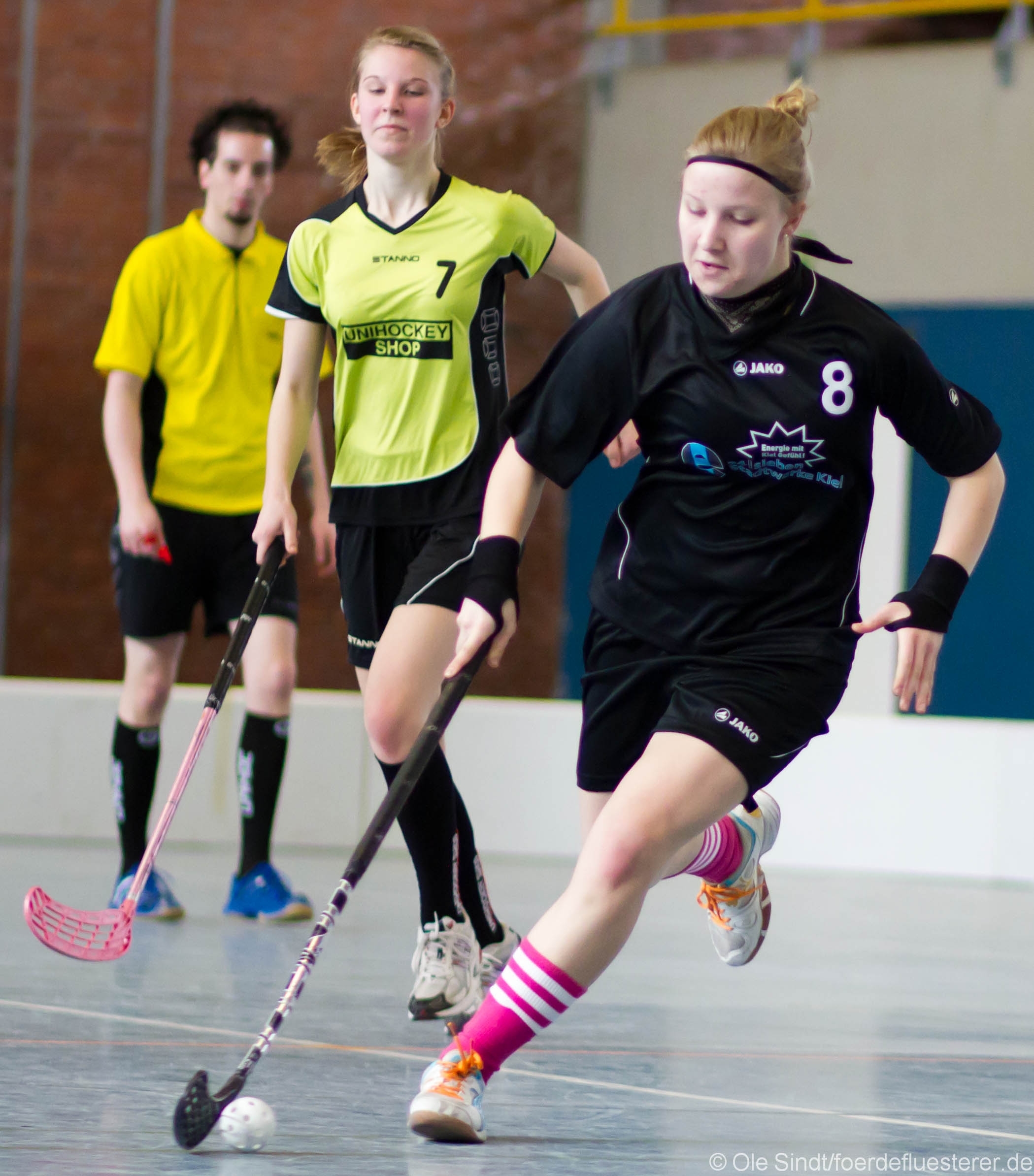 Women floorball